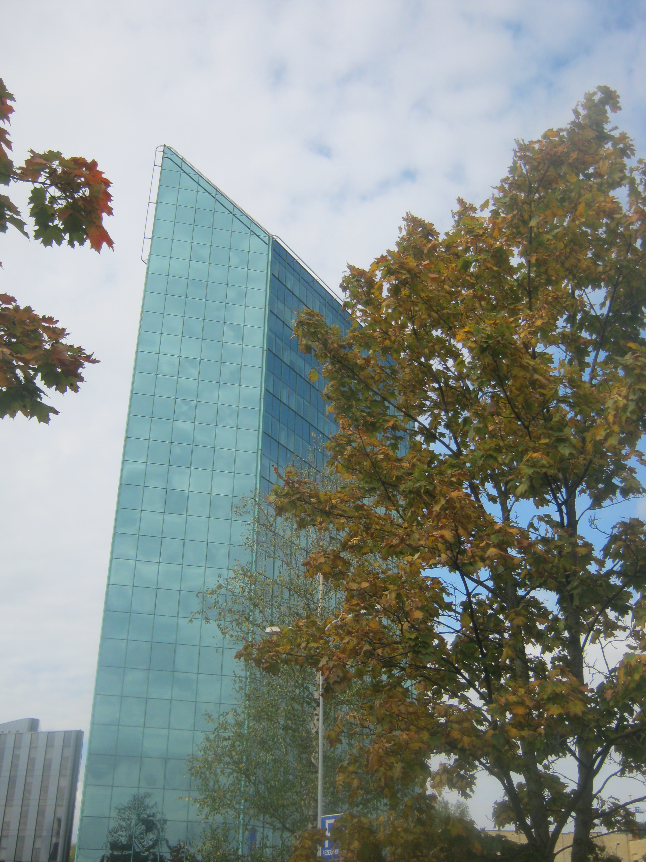 Vilnius